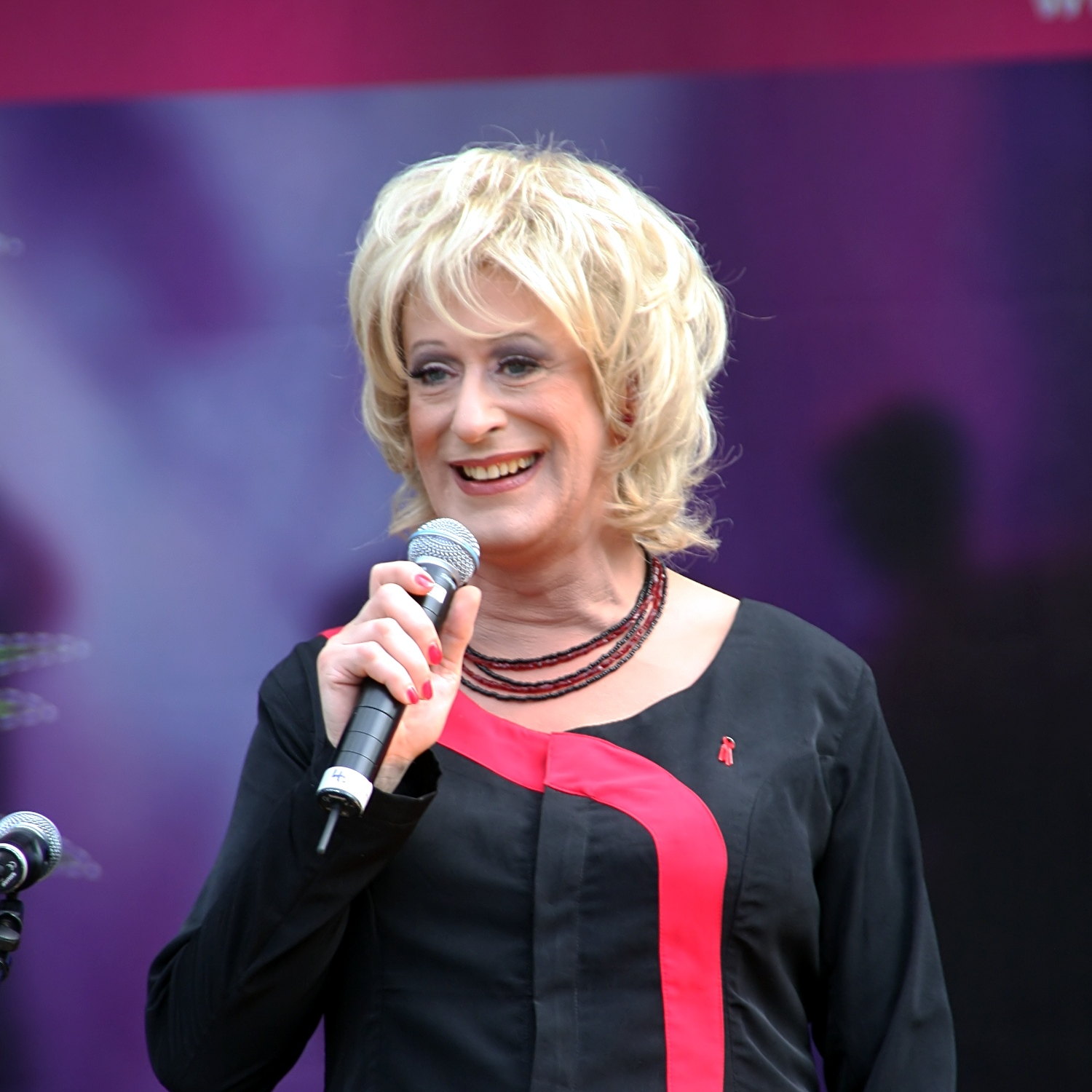 Lilo Wanders als Moderatorin auf der Hauptbühne auf dem Heumarkt, Köln. Bühnenprogramm zum CSD-Straßenfest/ColognePride 2009.